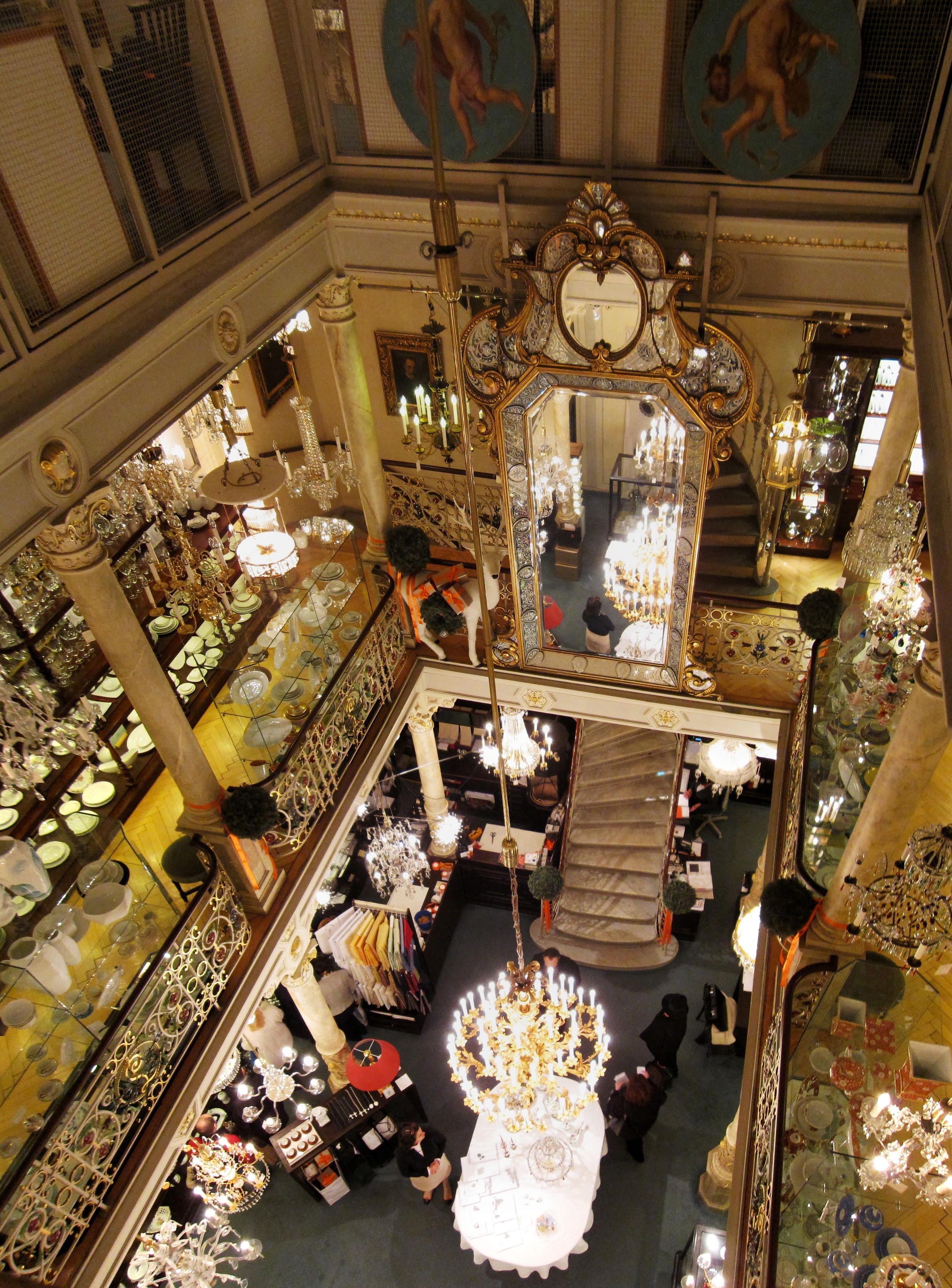 J. & L. Lobmeyr